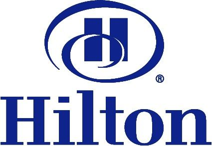 HOTELES